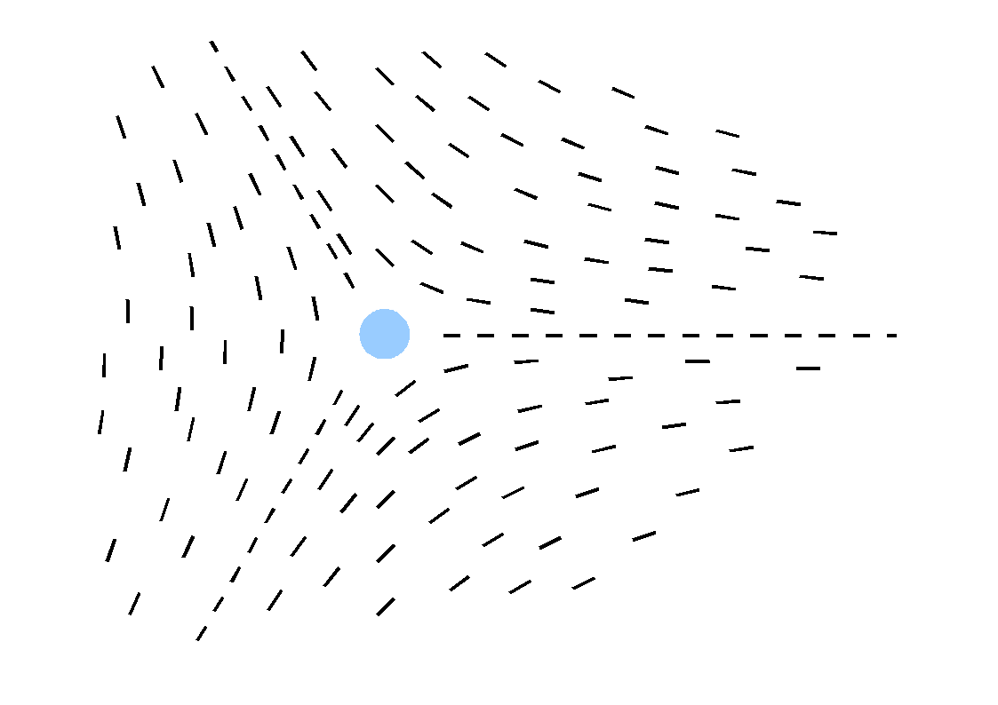 Cristal liquide :nématique disinclinaison m=-1/2